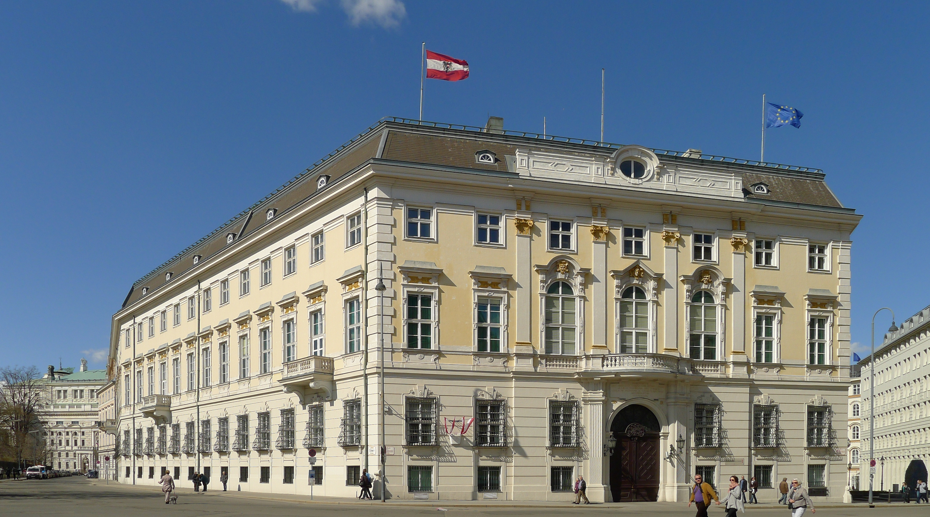 Bundeskanzleramt und Österr. Haus-, Hof- und Staatsarchiv